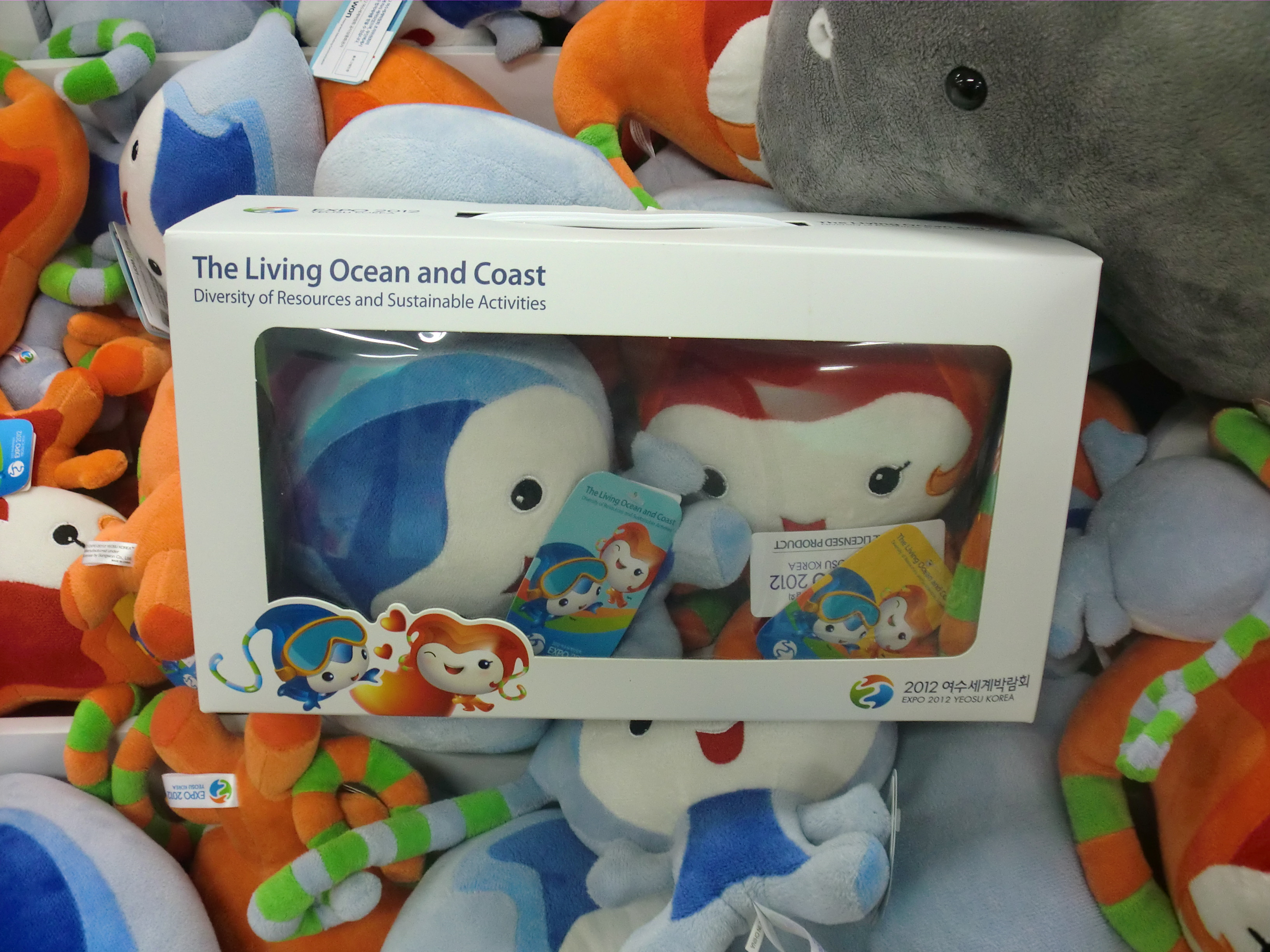 여수엑스포 마스코트 여니수니 인형